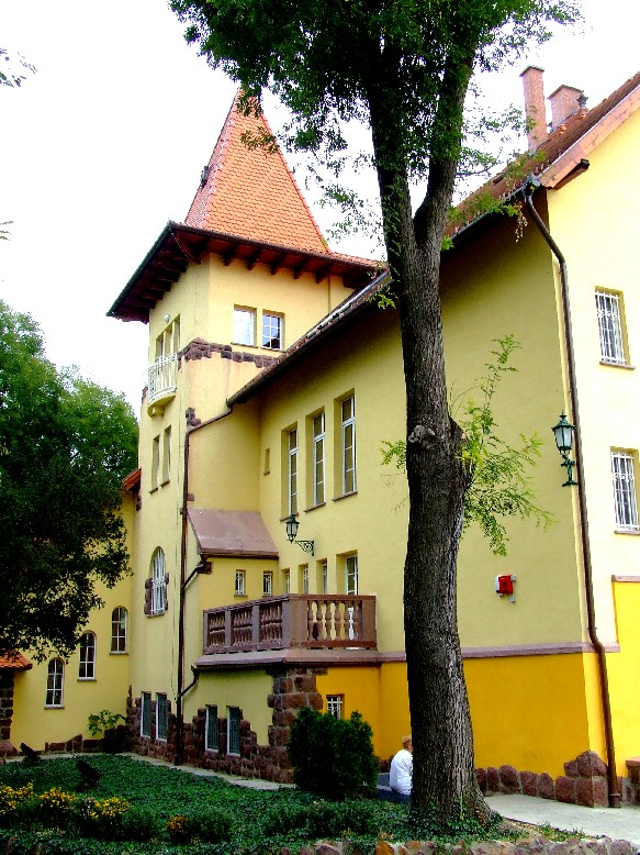 Fried-kastély, Simontornya